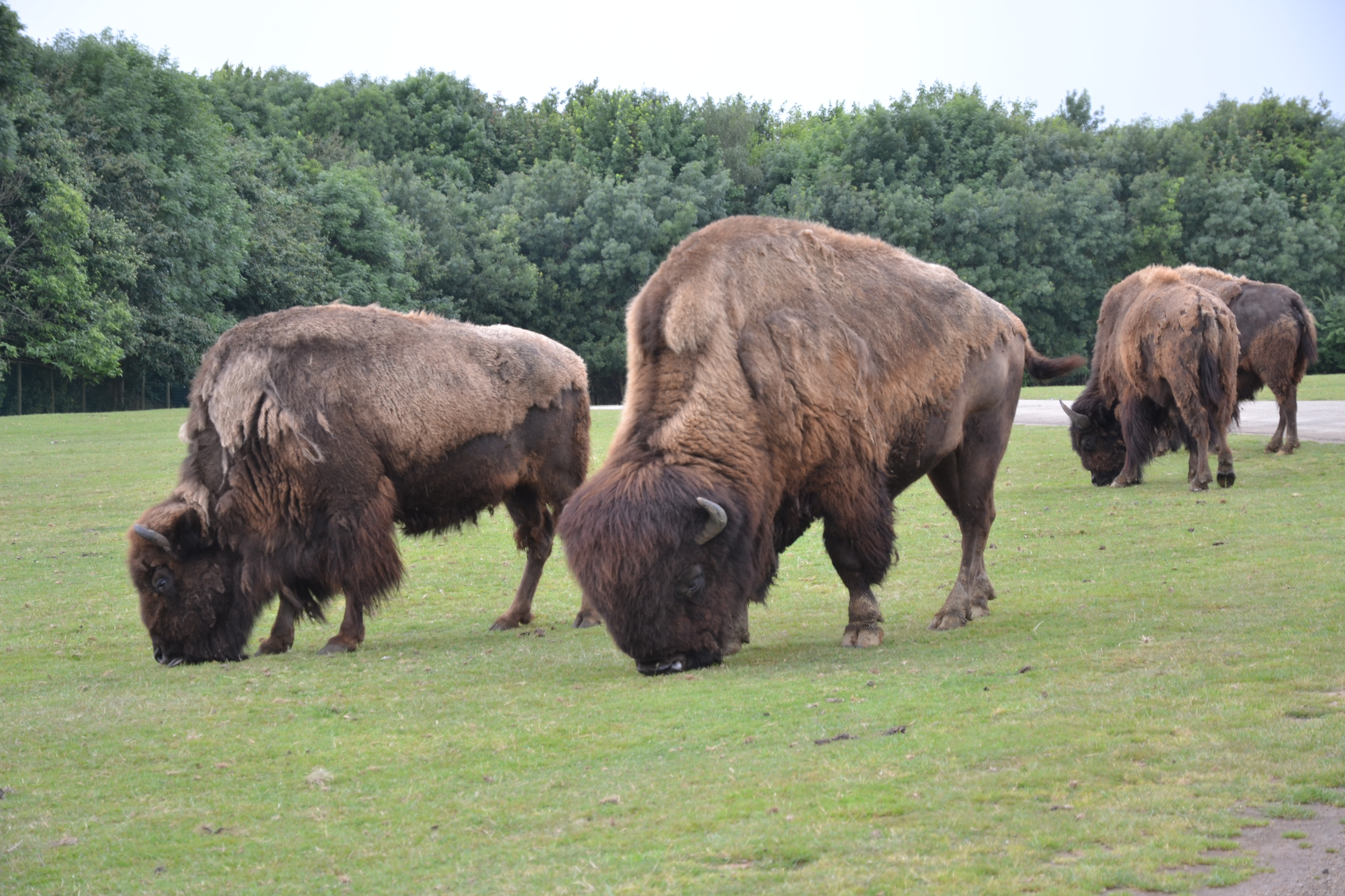 Bisons Planète Sauvage